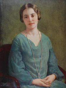 Paul Schroeter Portrait einer jungen Frau